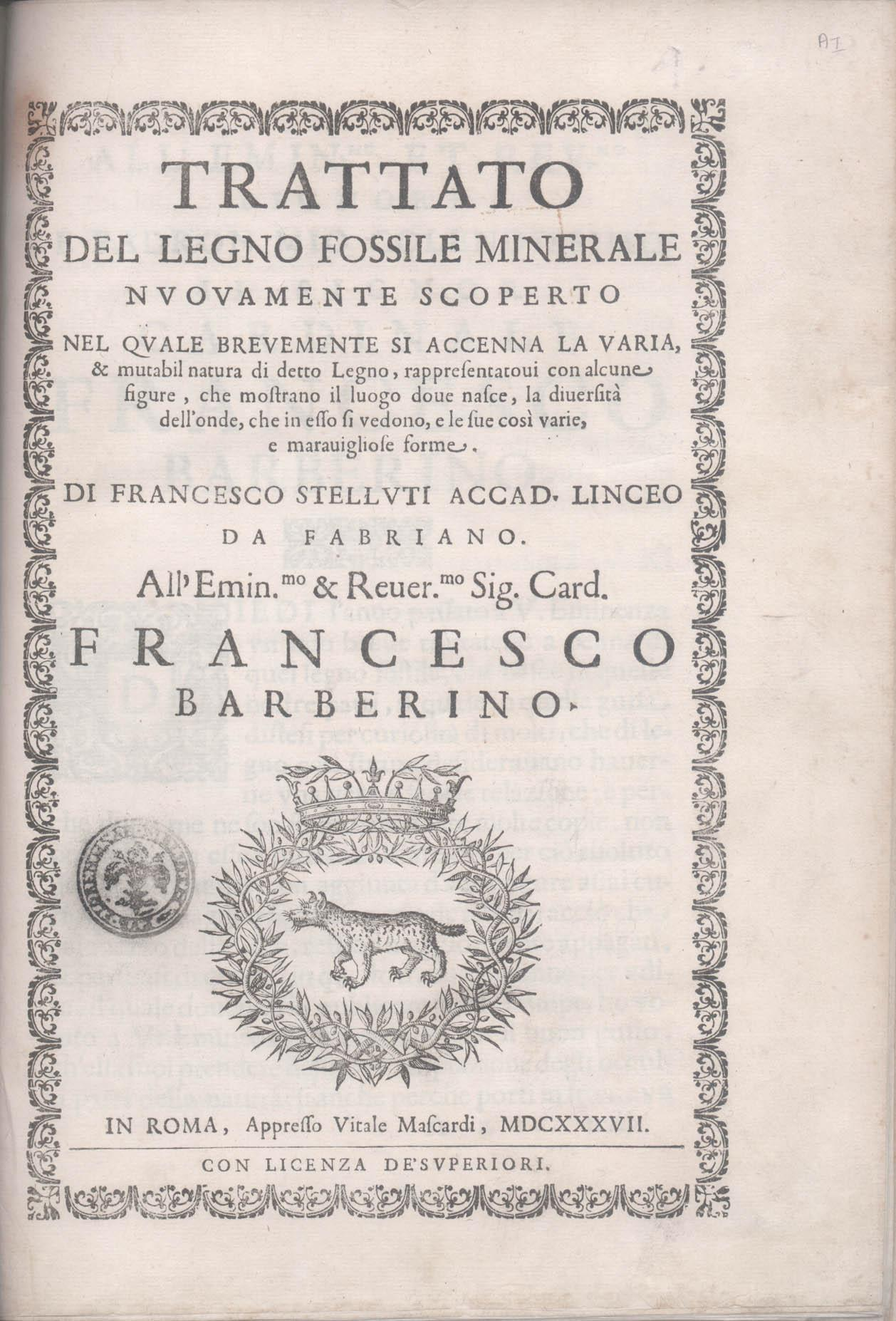 Trattato: title page